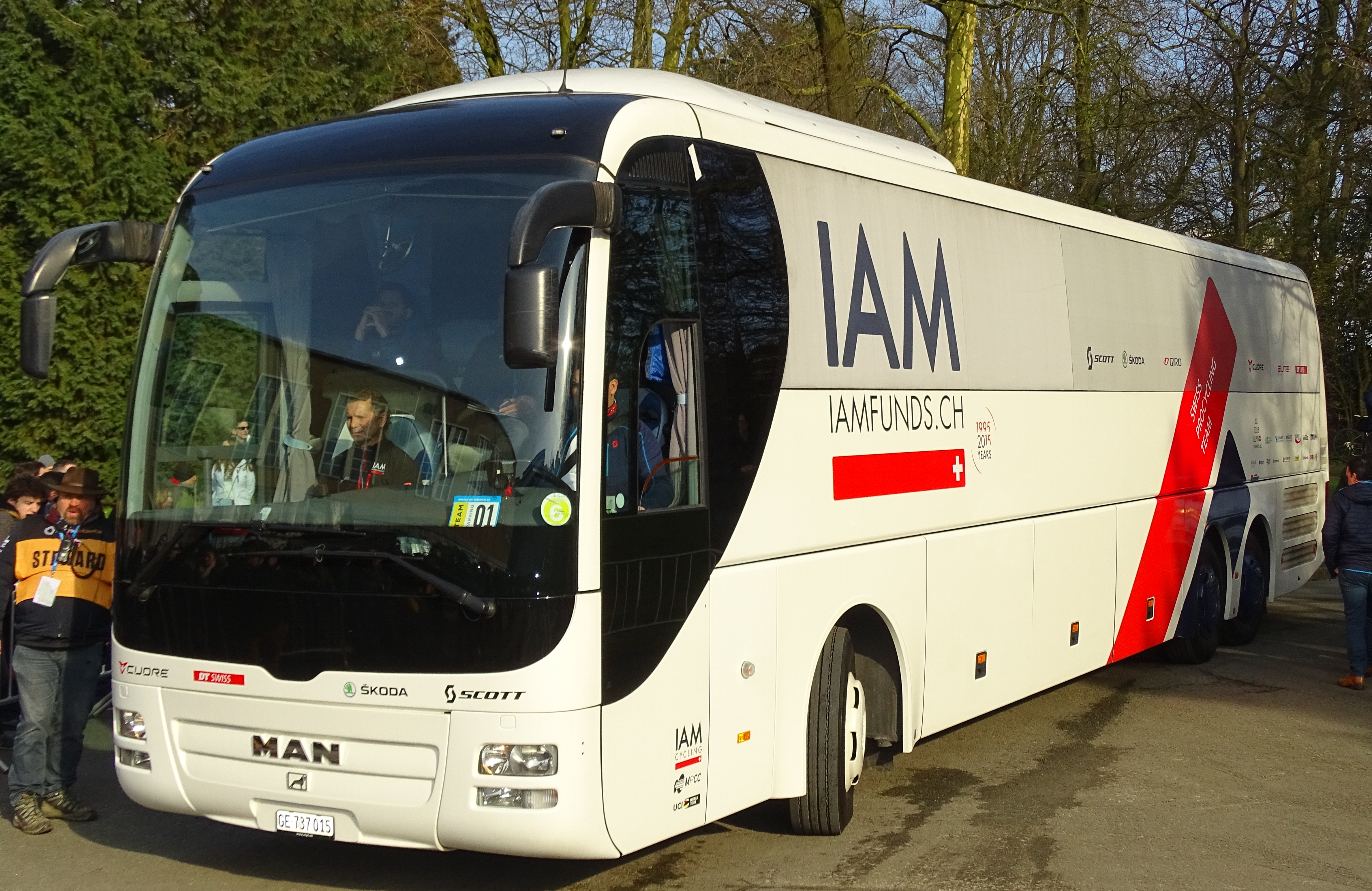 Reportage réalisé le samedi 27 février à l'occasion du départ et de l'arrivée du Circuit Het Nieuwsblad 2016 et de l'arrivée du Circuit Het Nieuwsblad féminin 2016 à Gand, Belgique.